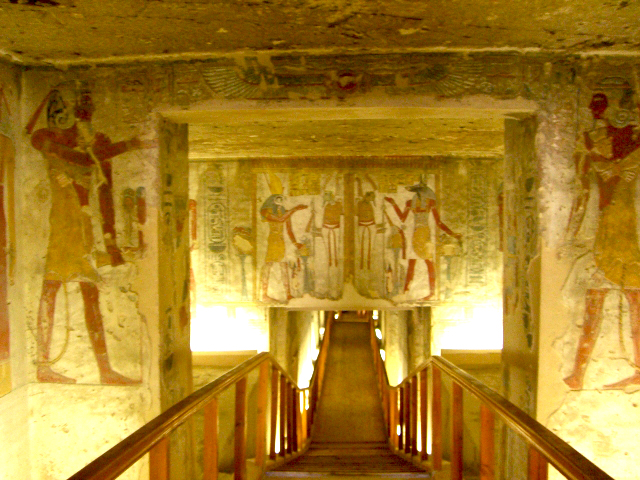 Vue de la descente de l'hypogée de la reine Taousert usurpé par Sethnakht - XIXe et XXe dynasties égyptiennes - Vallée des Rois The tomb of Twosret and Setnakhte showing descending corridor